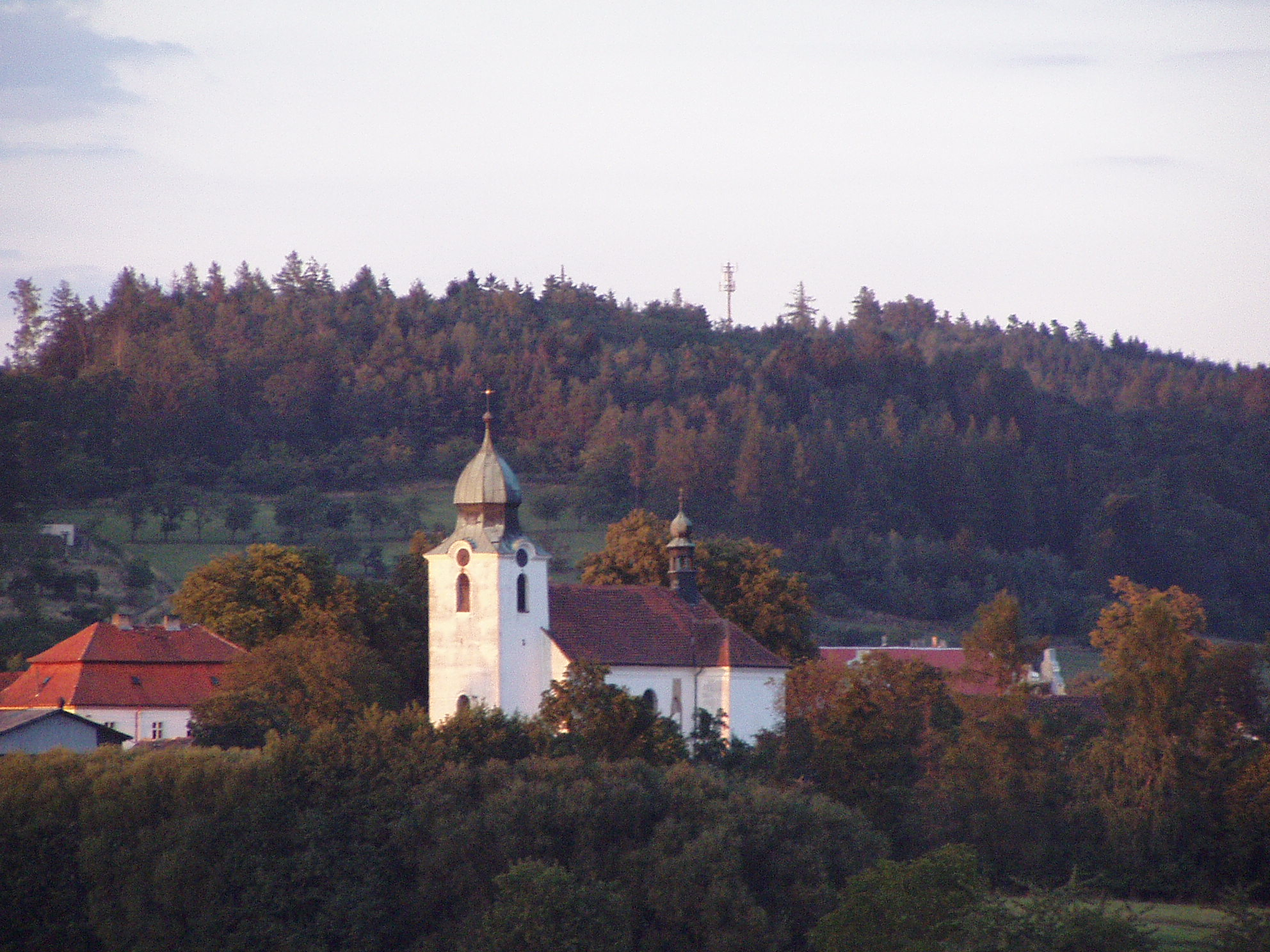 kostel sv. Mikuláše v Měčíně fotografovaný od Nedanic, PD-self